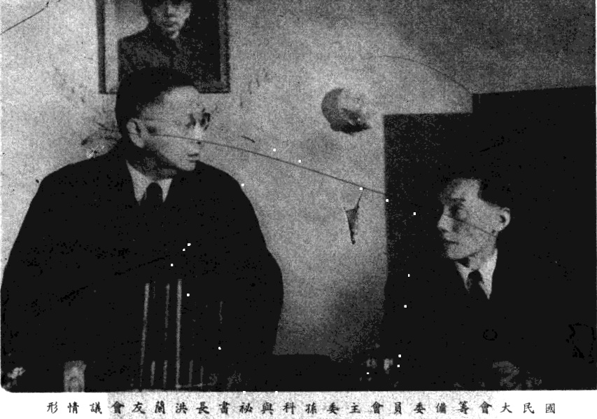 中文（台灣）: 第一屆國民大會專輯圖片